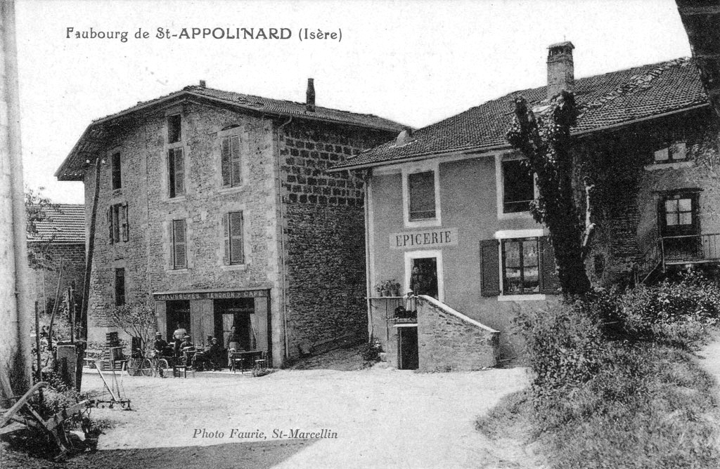 épicerie. Saint-Appolinard, Isère, France.